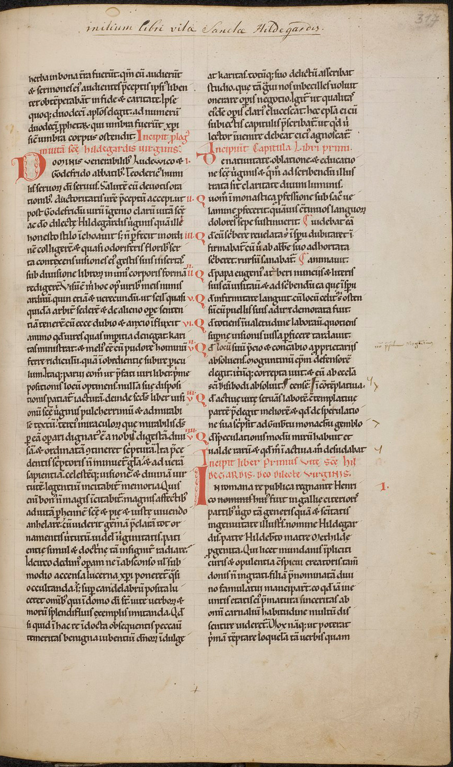 Initium Libri Vita Sanctae Hildegardis